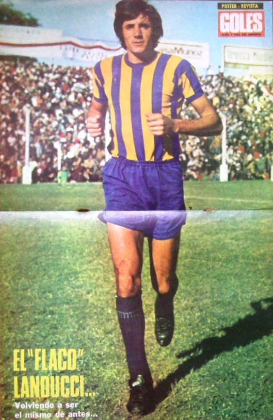 Angel Landucci